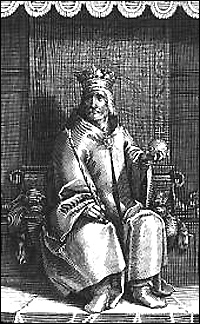 János Szapolyai